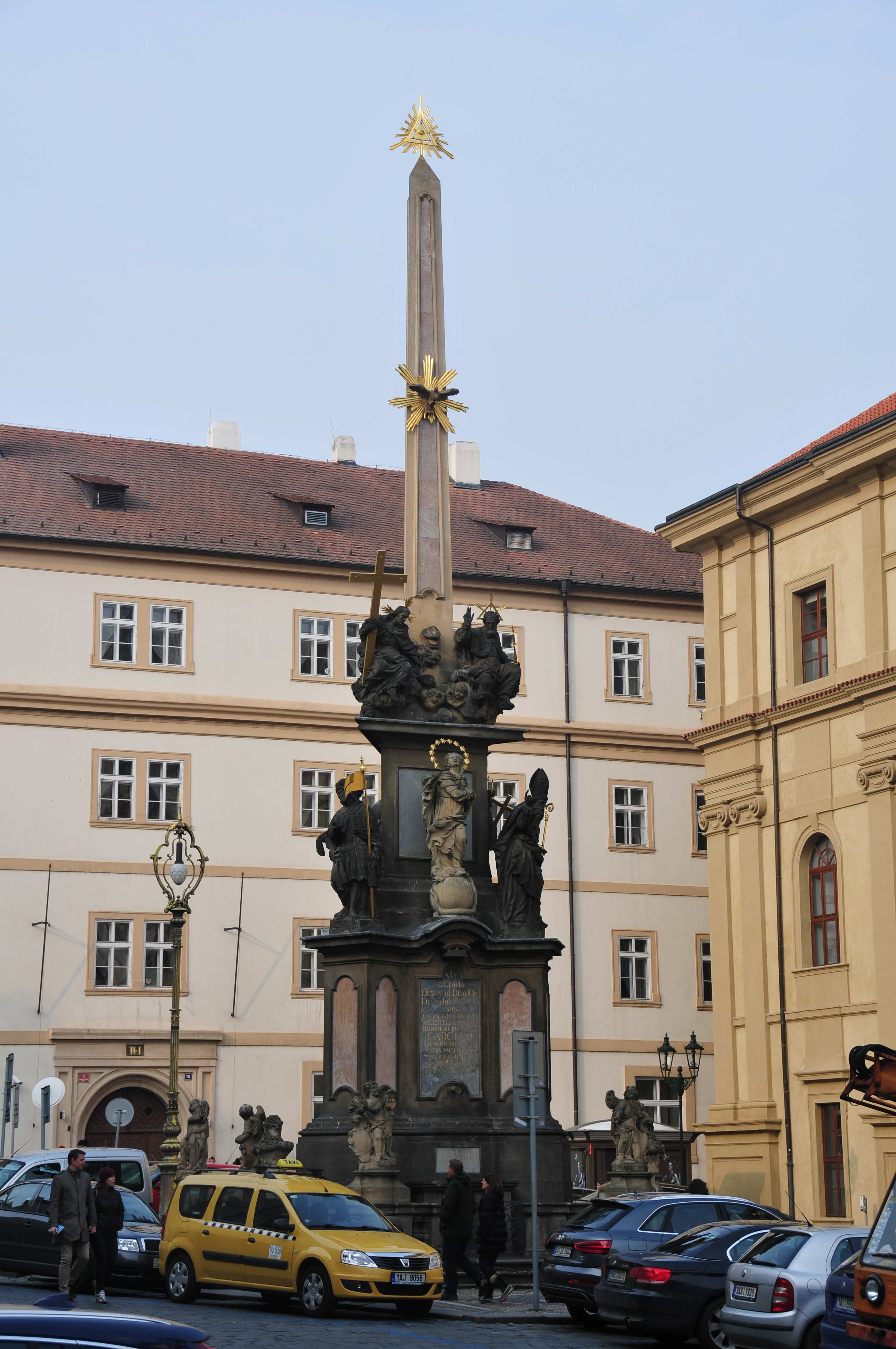 Prag